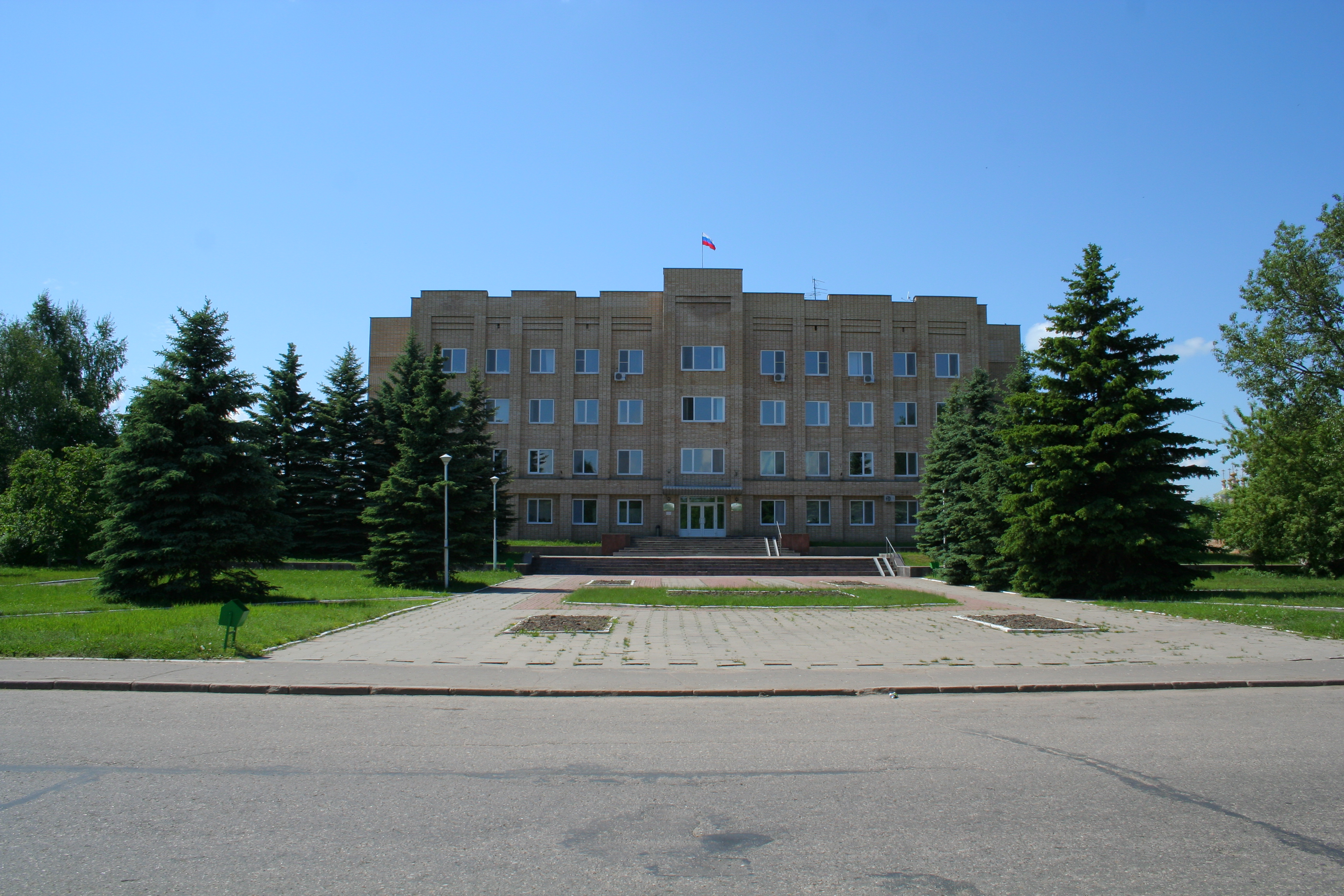 Stadt Gagarin (ehem. Gschatsk), Oblast Smolensk, Russland. Verwaltungssitz des Rajons Gagarin.